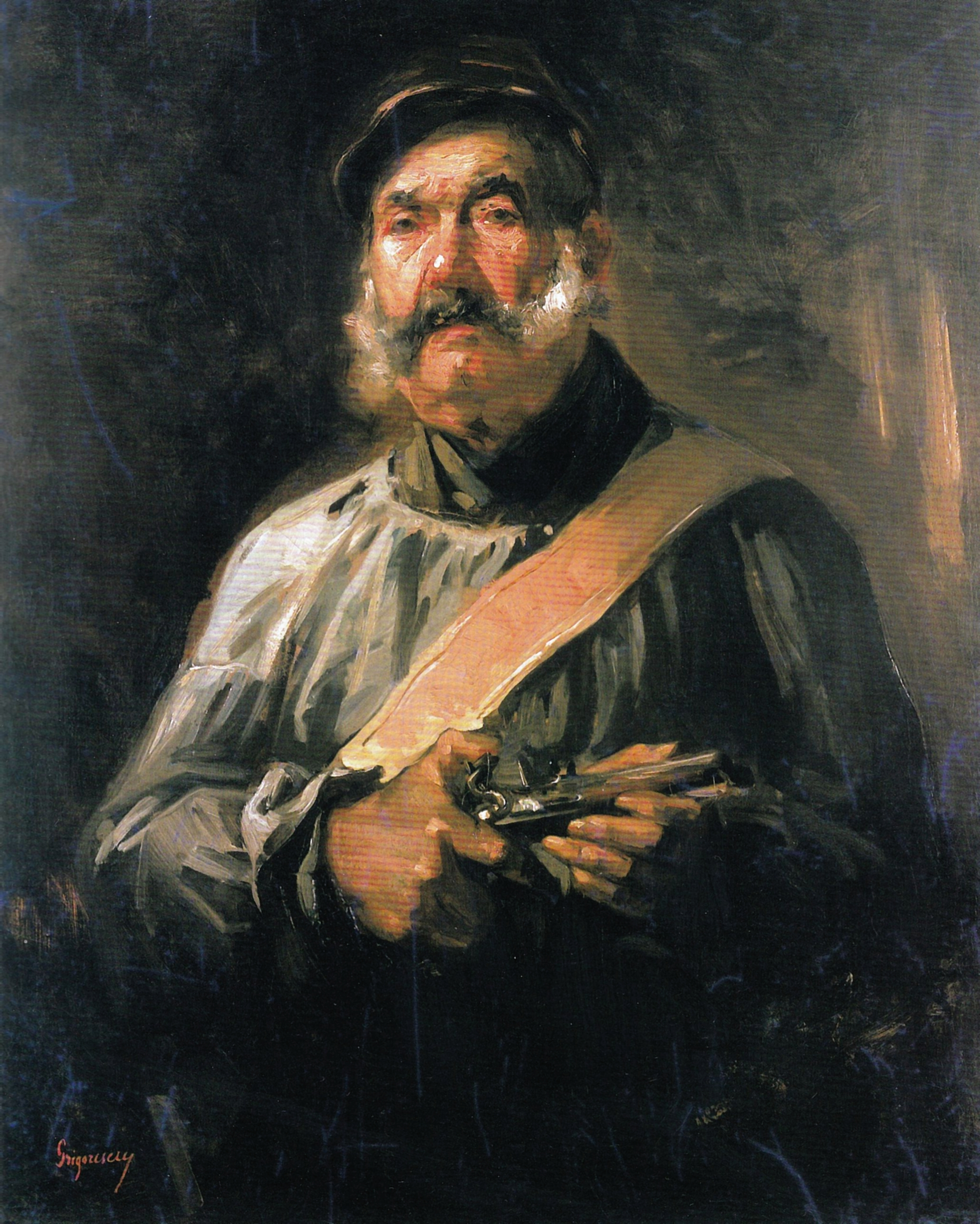 Paznicul de la Chailly, 88.5x69,5cm, ulei pe pânză, Nr. inventar. 69596/7536, Ordin de clasare 2052/07.02.2006 - Tezaur - la Muzeul Național de Artă al României. Acest tablou a figurat la Expoziţia Universală de la Paris din 1867 sub titlul "Chasseur dans les bois". Prezent la expoziţia Societăţii Amicilor Bellelor Arte din 1873, tabloul a fost cumpărat de Stat şi a intrat în Pinacotecă sub titlul de La Chailly. Paznicul este reprezentat sub trăsăturile unui bărbat în vârstă, cu favoriţi, caschetă de vânătoare, îmbrăcat cu o bluză de mătase şi încins cu diagonală. Expresia denotă preocupările de pătrundere fizionomică ale pictorului. Semnat stânga jos, cu roşu: Grigorescu.